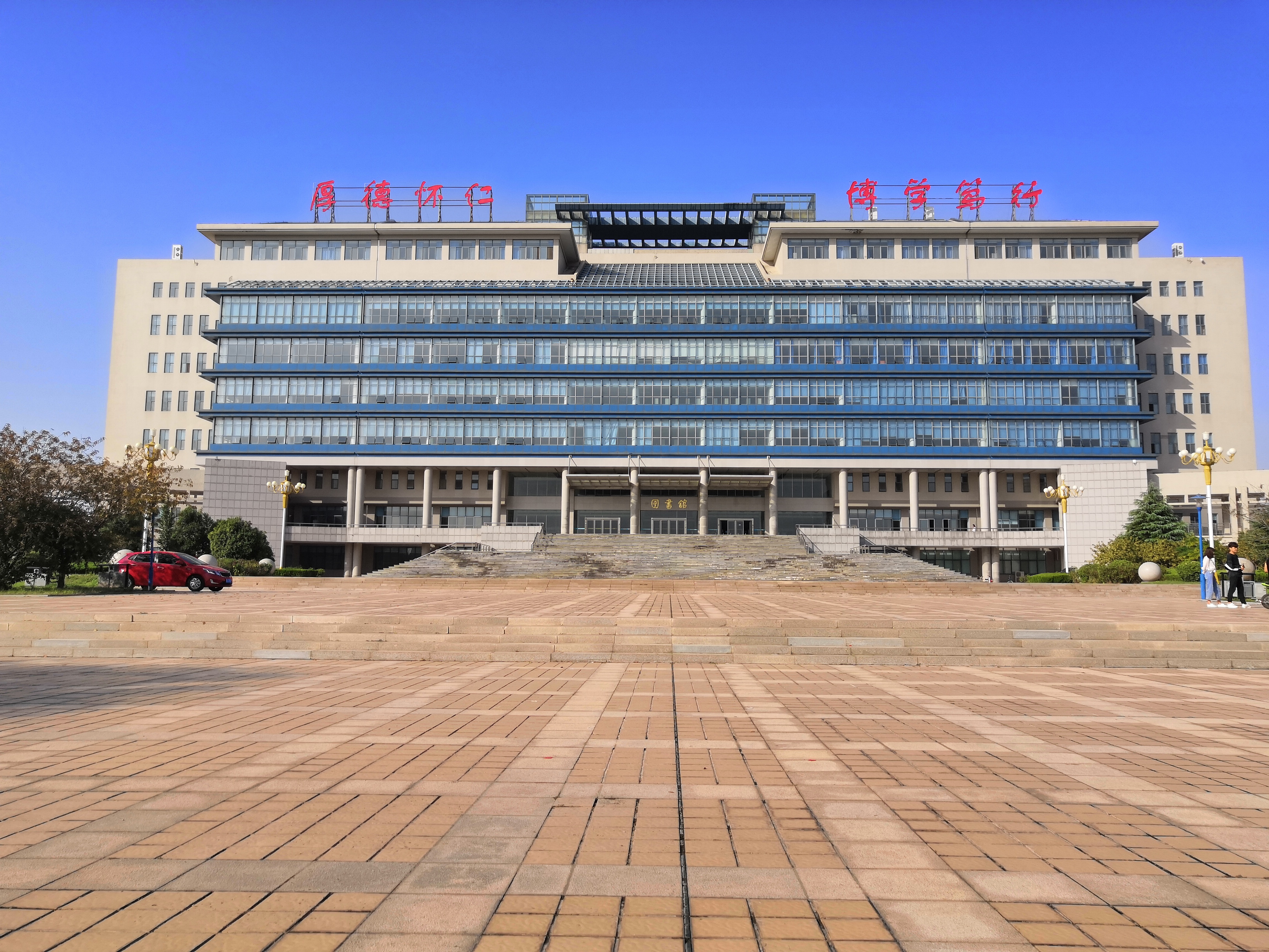 "厚德怀仁 博学笃行"为山东中医药大学校训